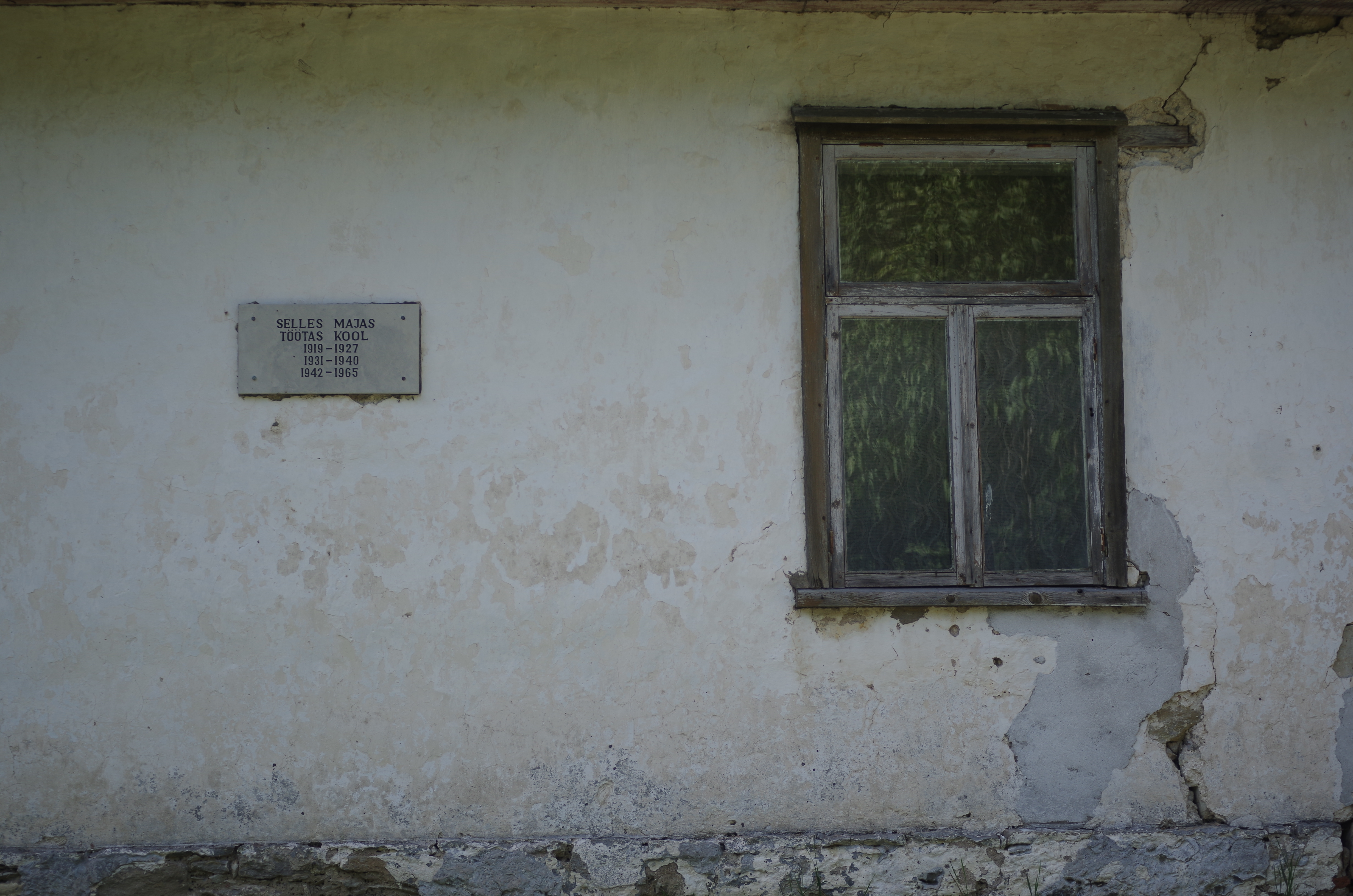 Ilpla mõisa peahoonel olev mälestustahvel kooli tegevuse kohta.